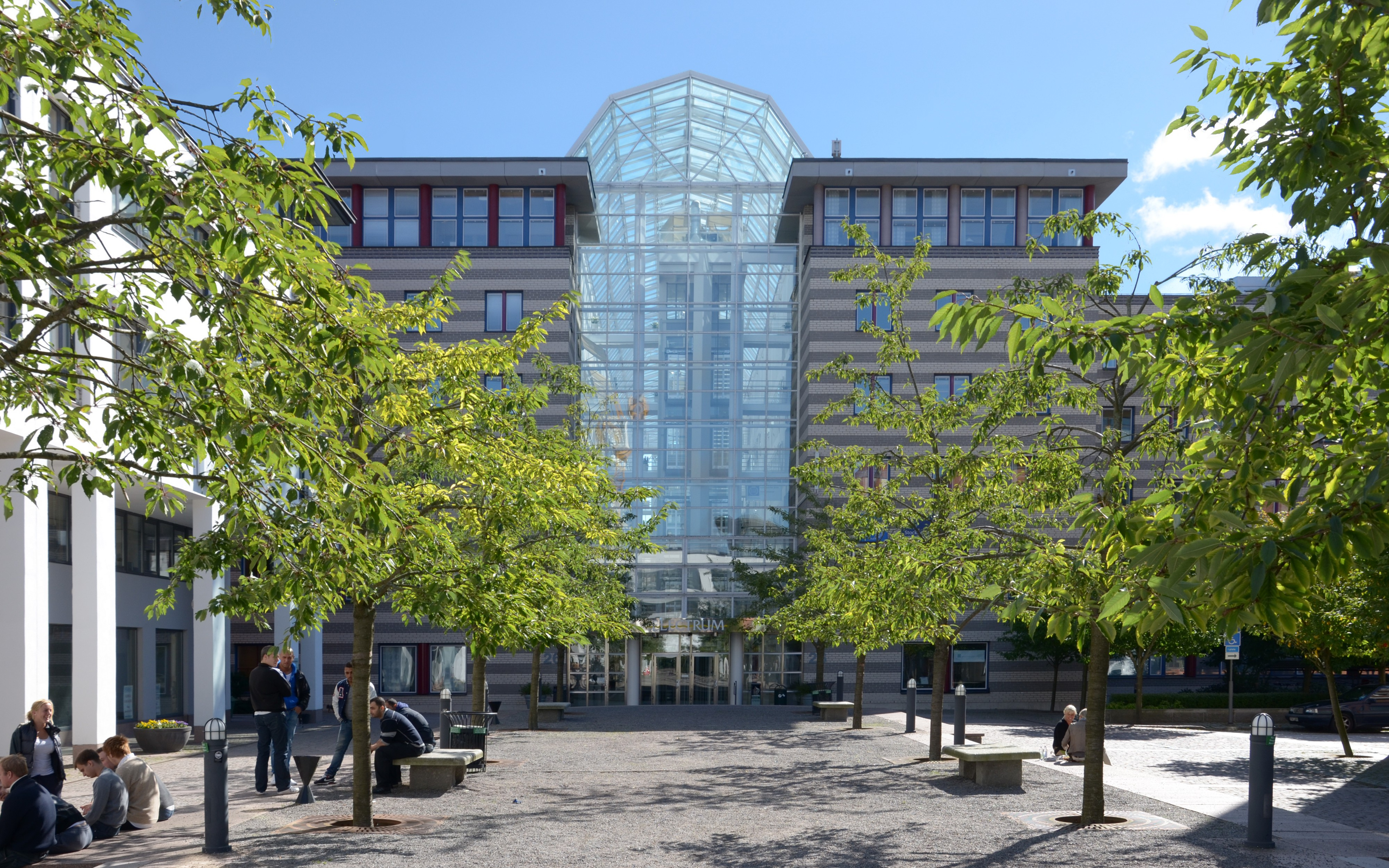 Elektrum. En av byggnaderna på Kungliga Tekniska högskolans campus i Kista.